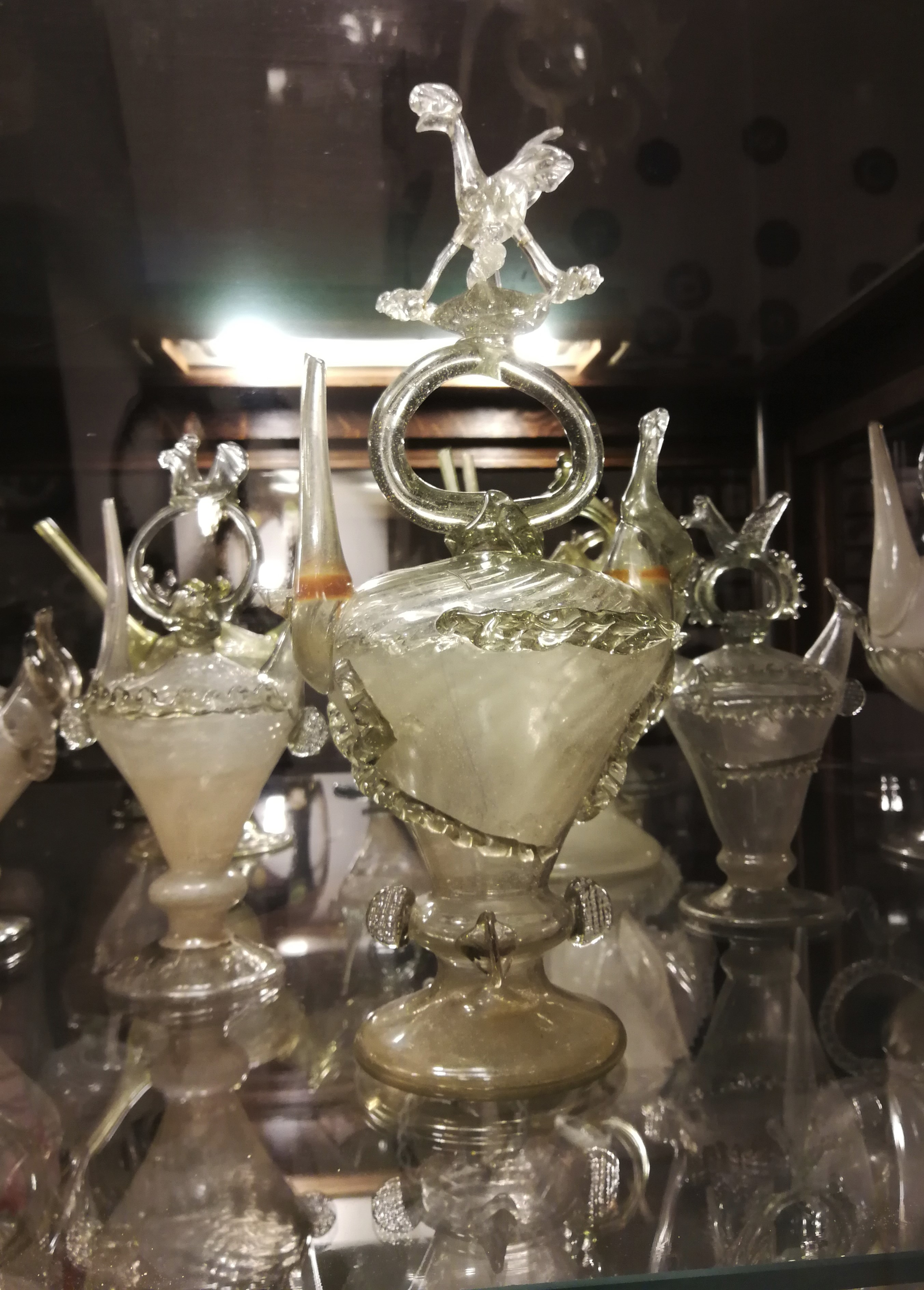 Katalanischer Hochzeits-Càntir (verzierter Schnabelkrug zum Wasser- oder Weintrinken, Ausführung für den Mann, Museo del Vidre de Perelada)